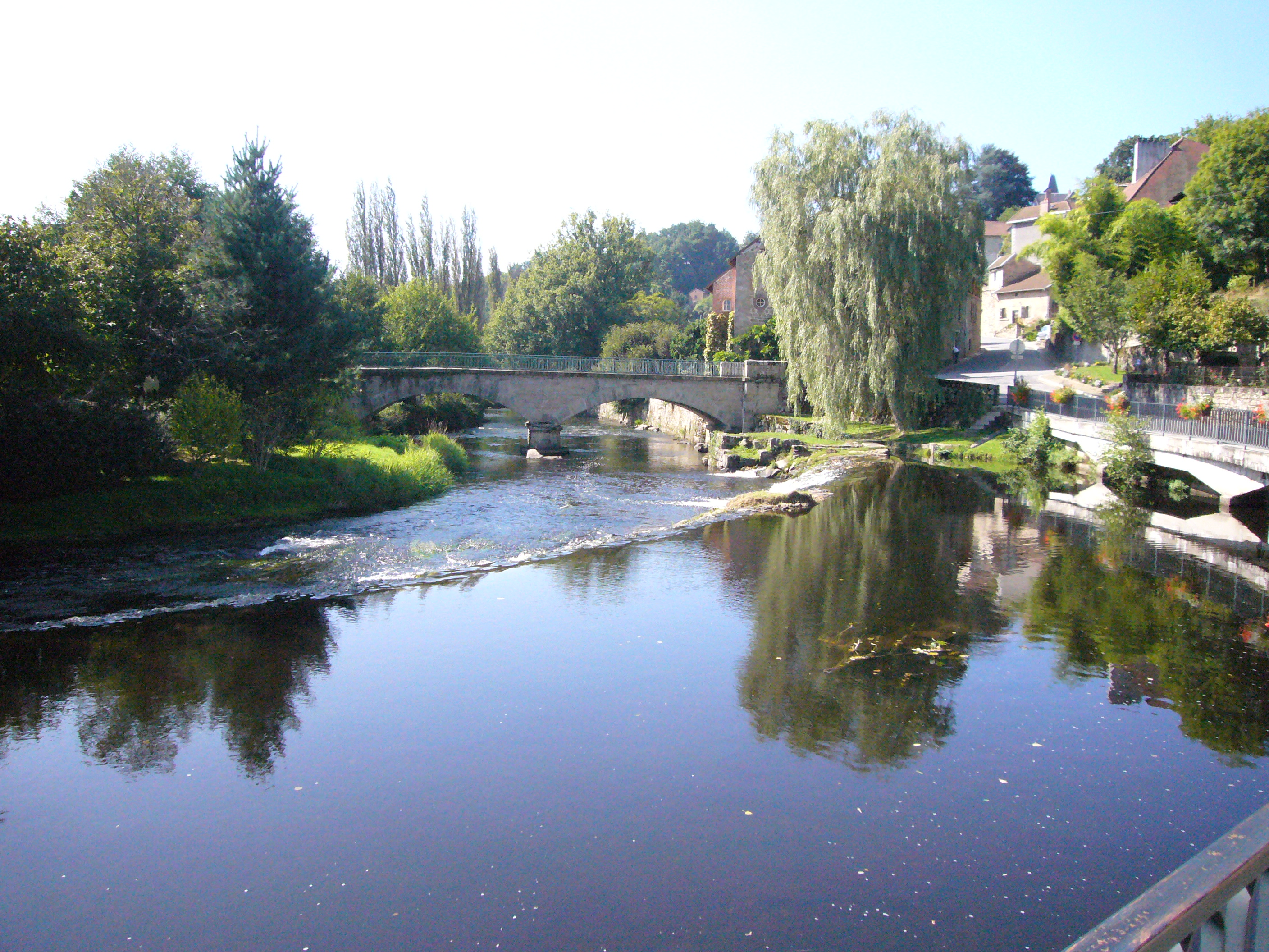 La Vienne à Eymoutiers (Haute-Vienne, France)